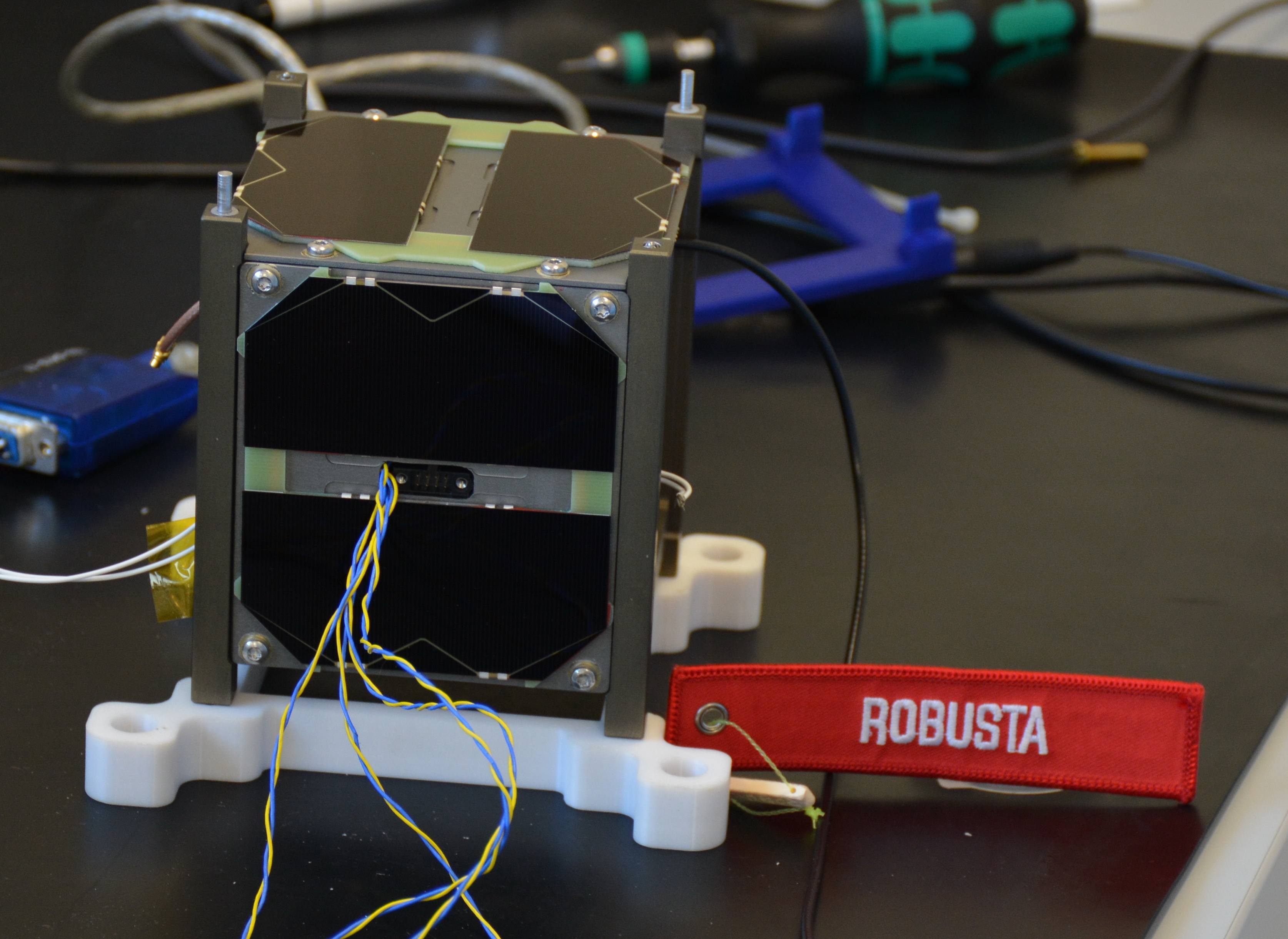 image de robusta 1b